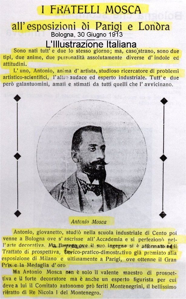 articolo di giornale